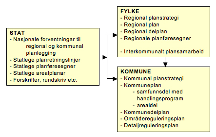 Grafisk fremstilling av det norske planleggingssystemet